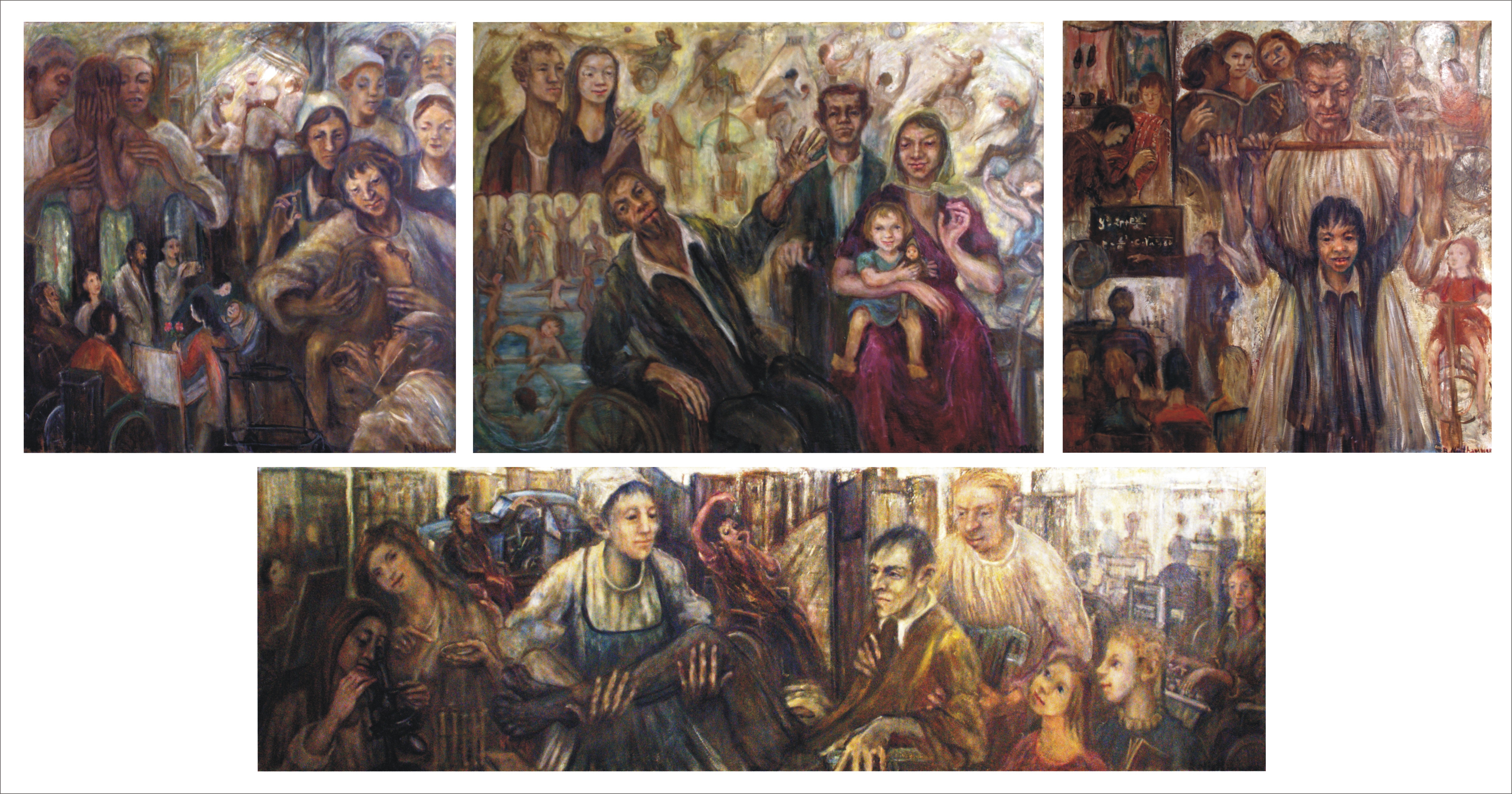 Das vierteilige Werk wurde als Auftragsarbeit für das Krankenhaus Berlin-Buch gemalt.